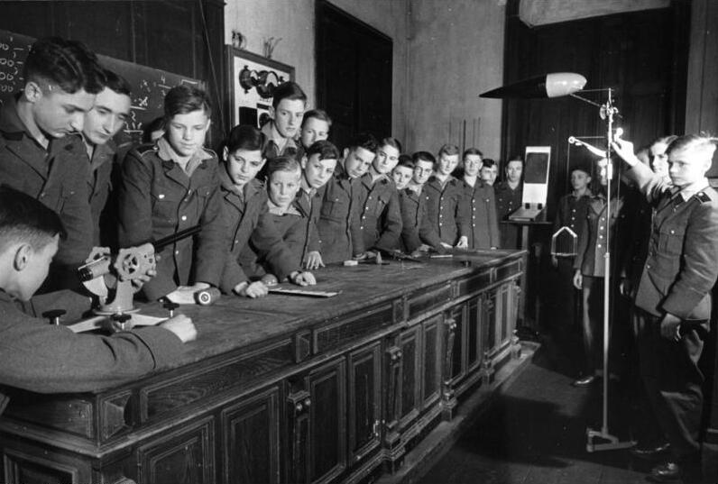 4/ Nationalpolitische Erziehungsanstalt Der Unterricht der nationalpolitischen Erziehungsanstalt kommt im großen und ganzen dem der Oberschulen gleich. Jedoch kommt in stärkeren Maße der Wehrgedanke zu seinem Recht. Durch Modellversuche werden in der Physikstunde unter Leitung des Erziehers die Vorgänge beim Schuß erläutert. Ein anderer Versuch (rechts) dient dem Verständnis für Luftwiderstand an verschieden geformten Flugkörpern.